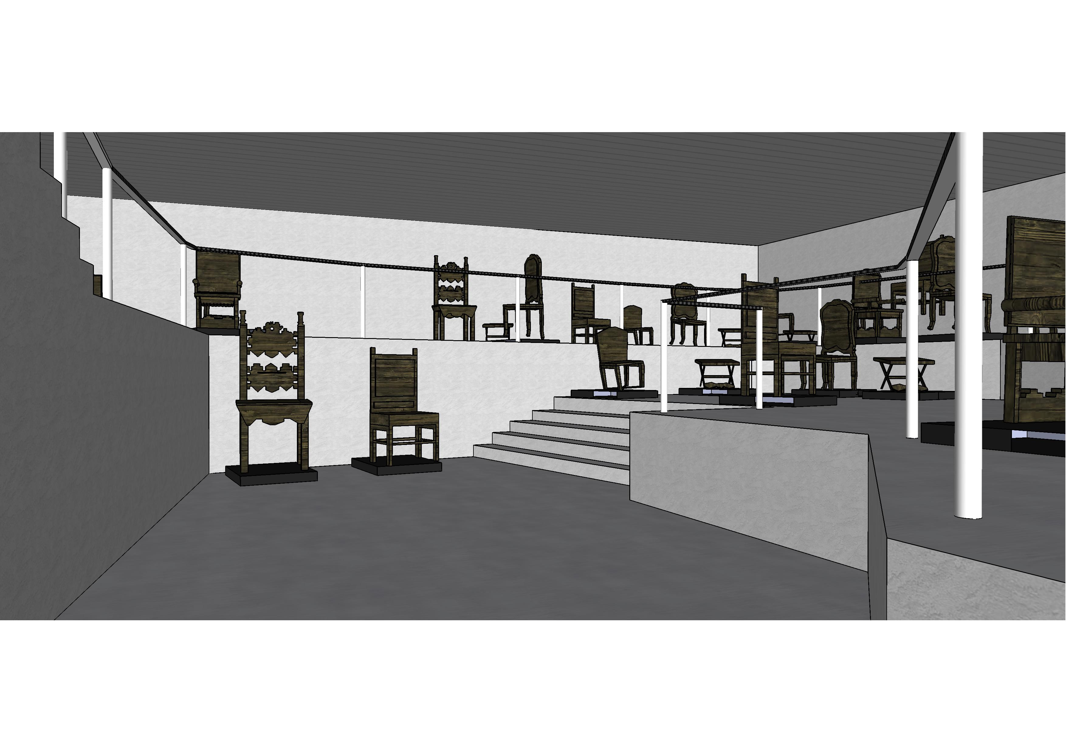 Template:Screenshotcopyrighted